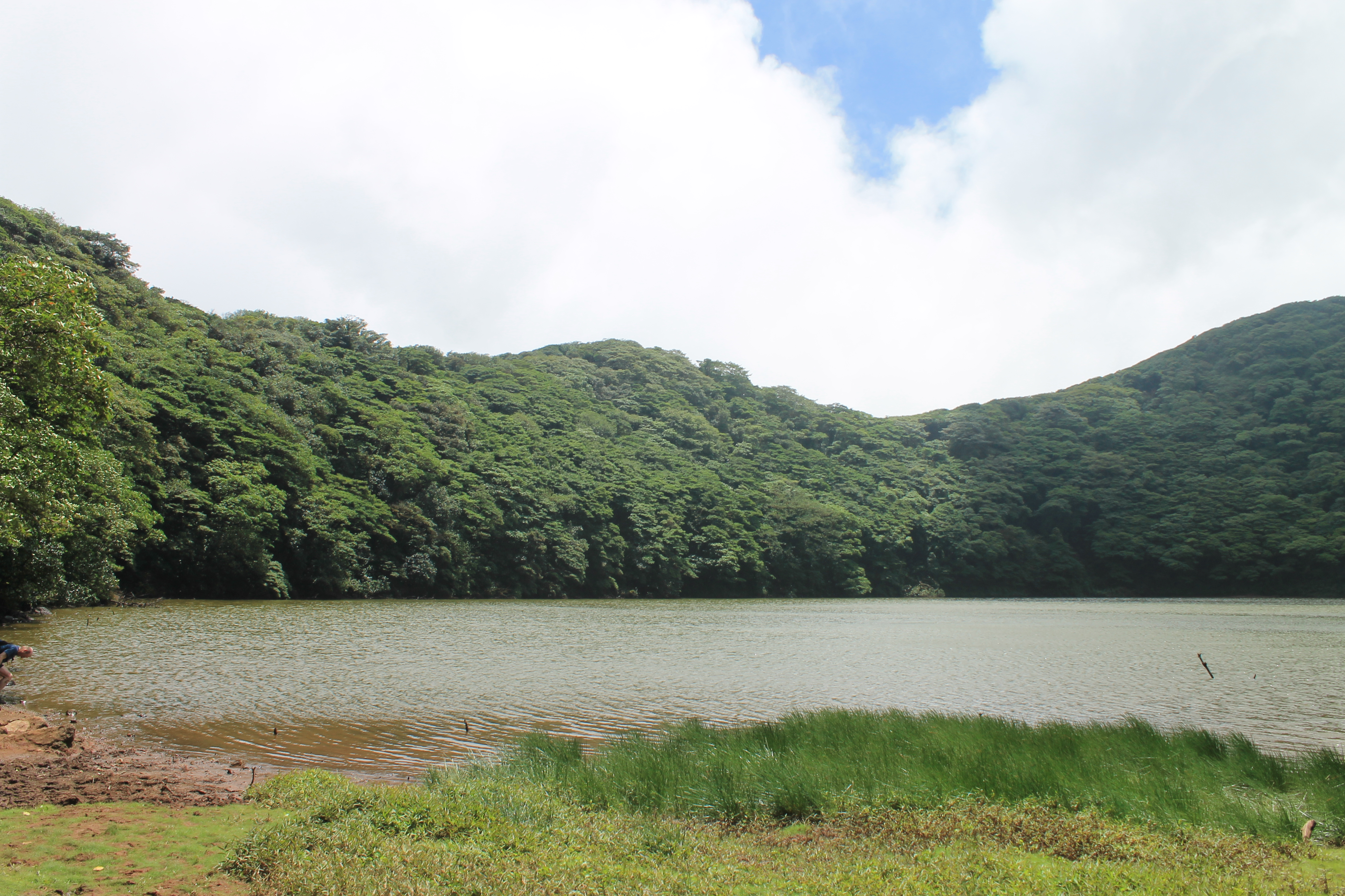 Laguna Volcan Maderas Ometepe